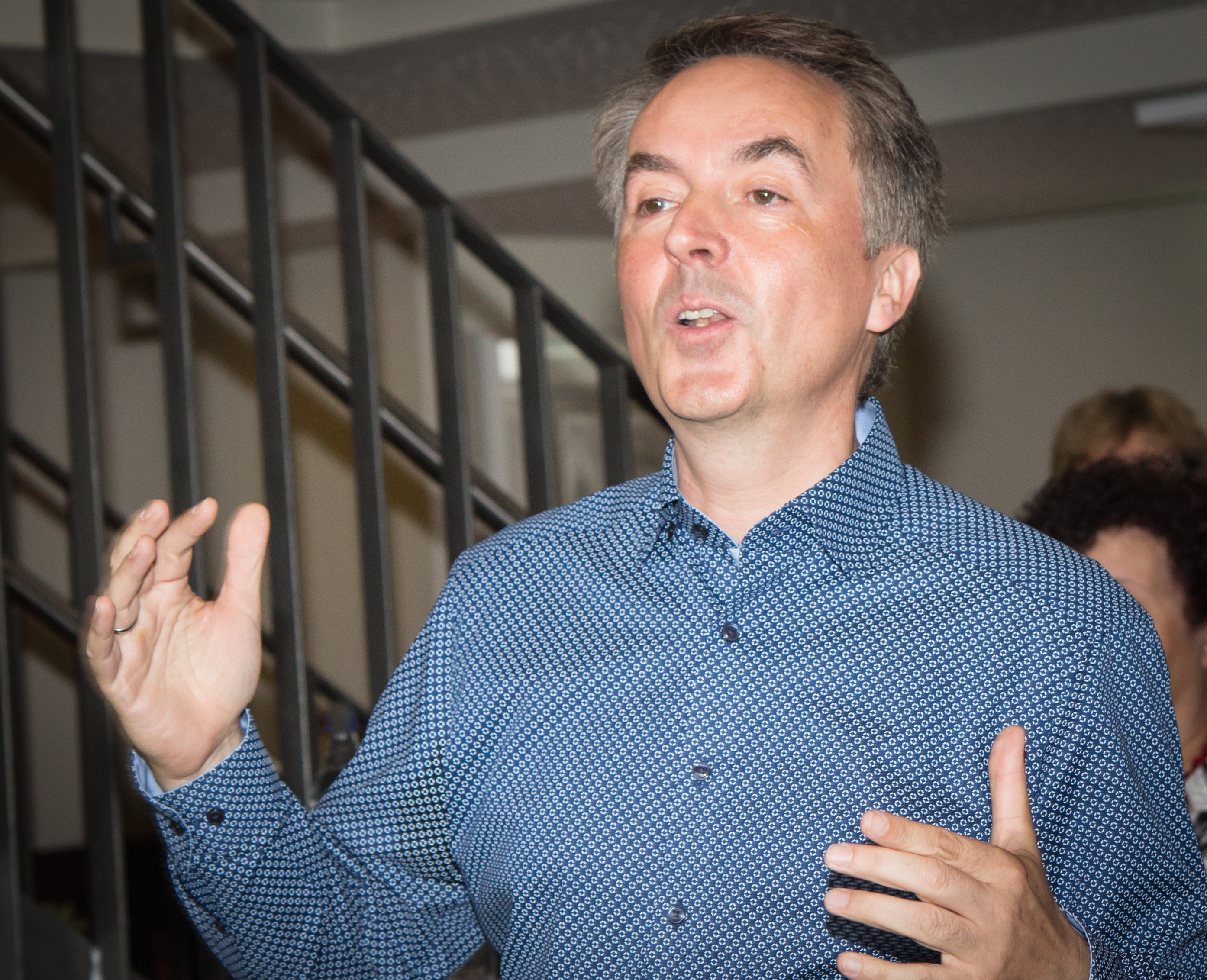 Michael Kokott, Chorleiter, Musikschullehrer und Kirchenmusiker. Bei der Verleihung des Rheinlandtalers des LVR an die Höhner dirigierte er den Jugendchor „Grenzenlos“